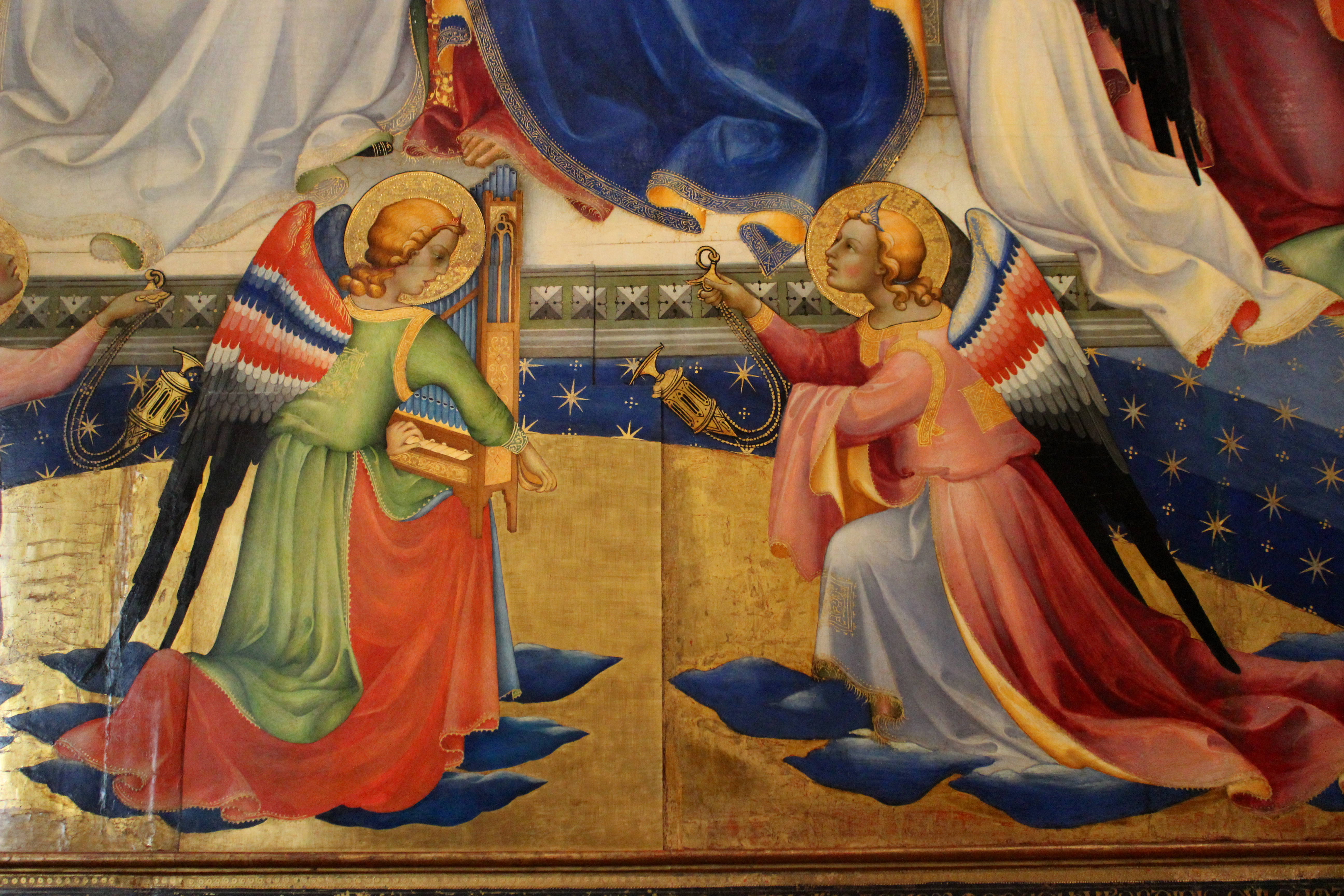 Lorenzo Monaco. Coronación de la Virgen. Uffizi.